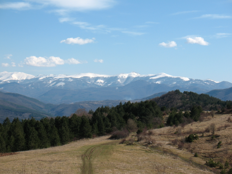 Златишко-тетевенска Стара планина, гледани от Лакавишкия рид при Правец